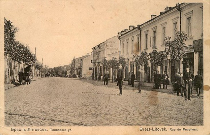 Беларуская (тарашкевіца): Берасьце (Bieraście), вуліца Тапалёвая (vulica Tapalovaja)